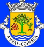 Brasão do Ameal